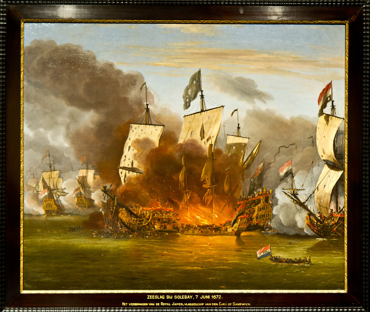 Schilderij Zeeslag bij Solebay - Het verbranden van de Royal James, vlaggeschip van den Earl van Sandwich. Schilderij door Willem van de Velde de Jongere in het Nederlands Scheepvaartmuseum.